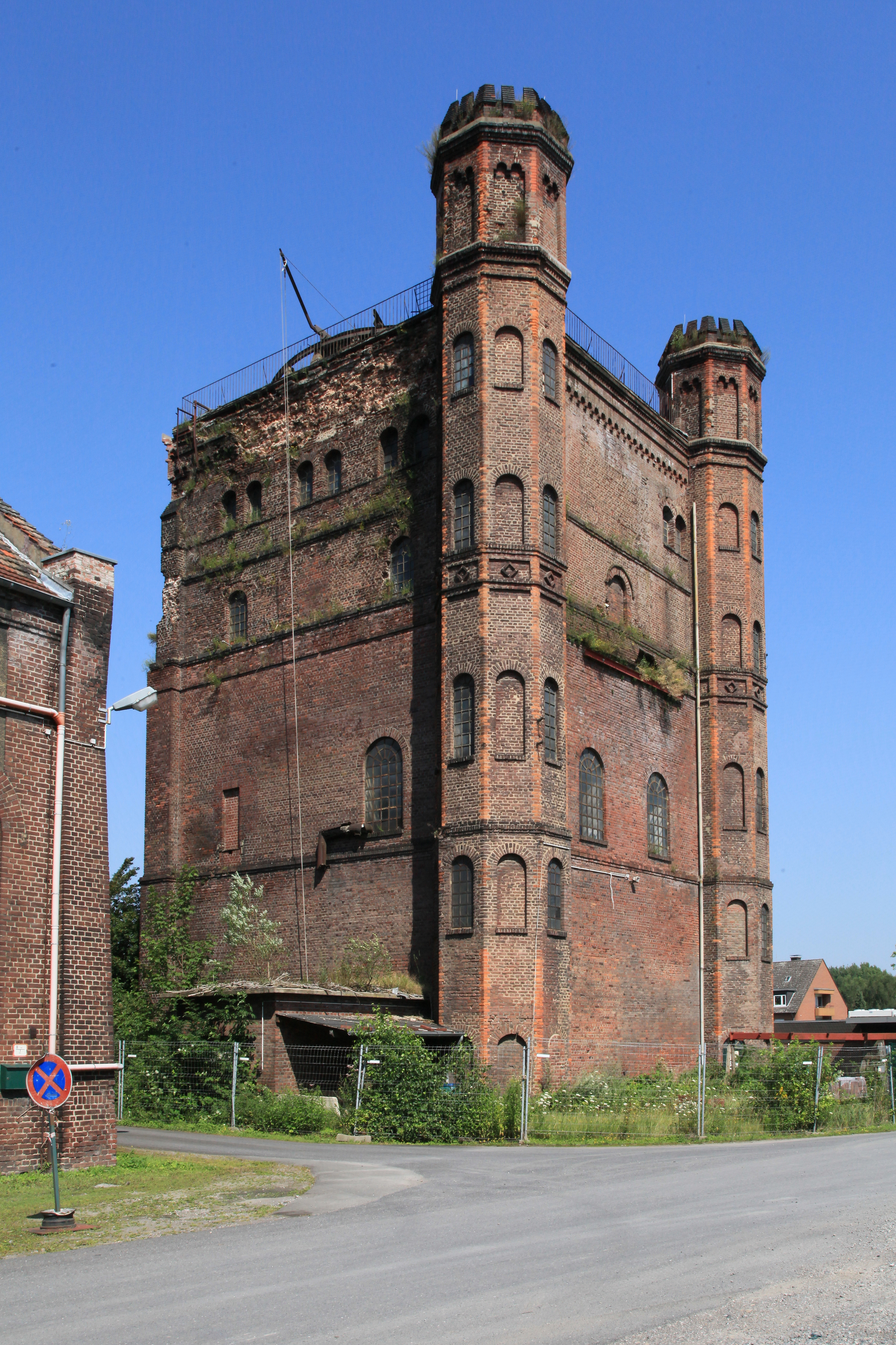 Schacht 1 (Malakowturm) der Zeche Westhausen, Bodelschwingher Straße in Dortmund